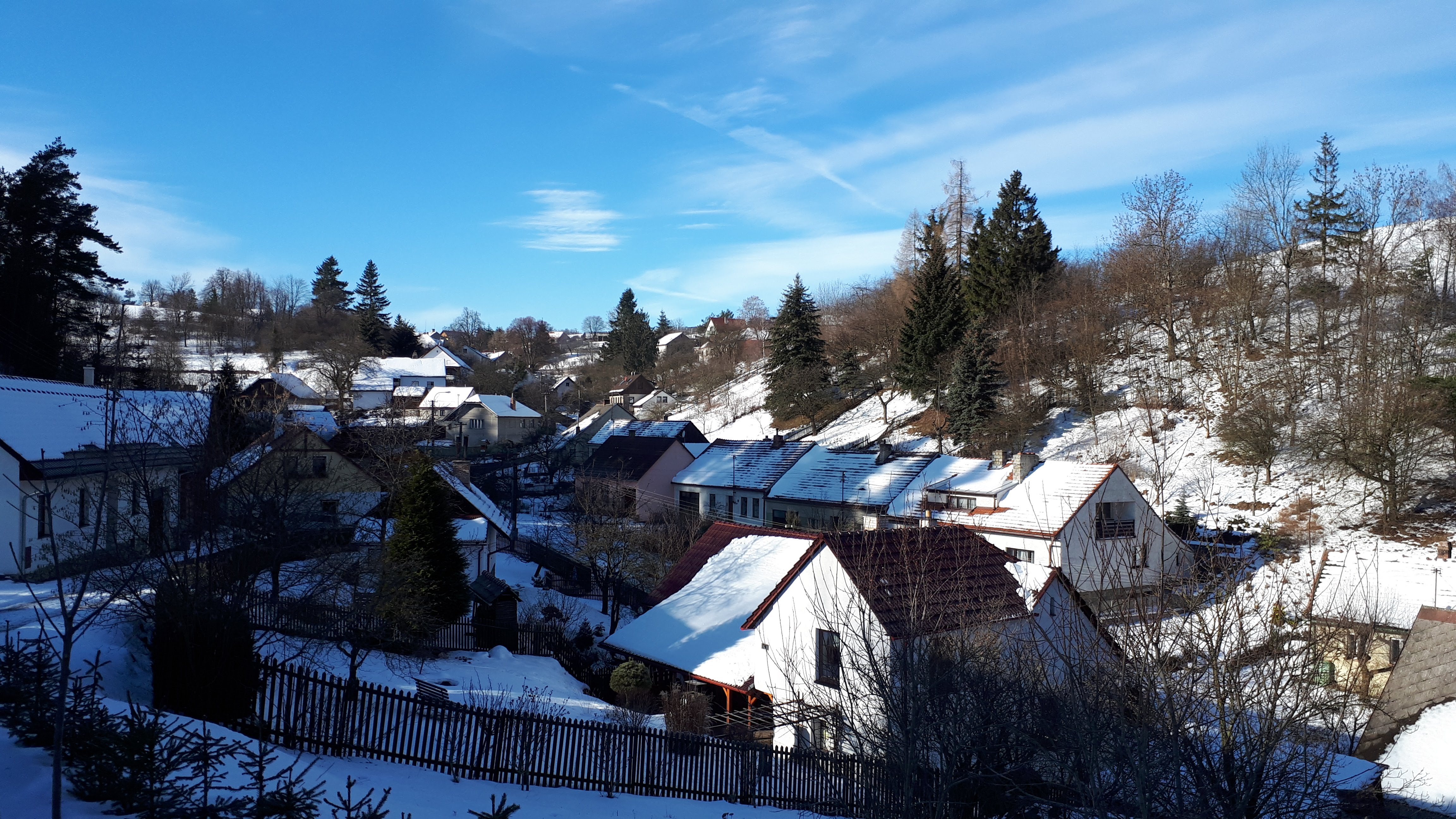 Repechy zima 2019